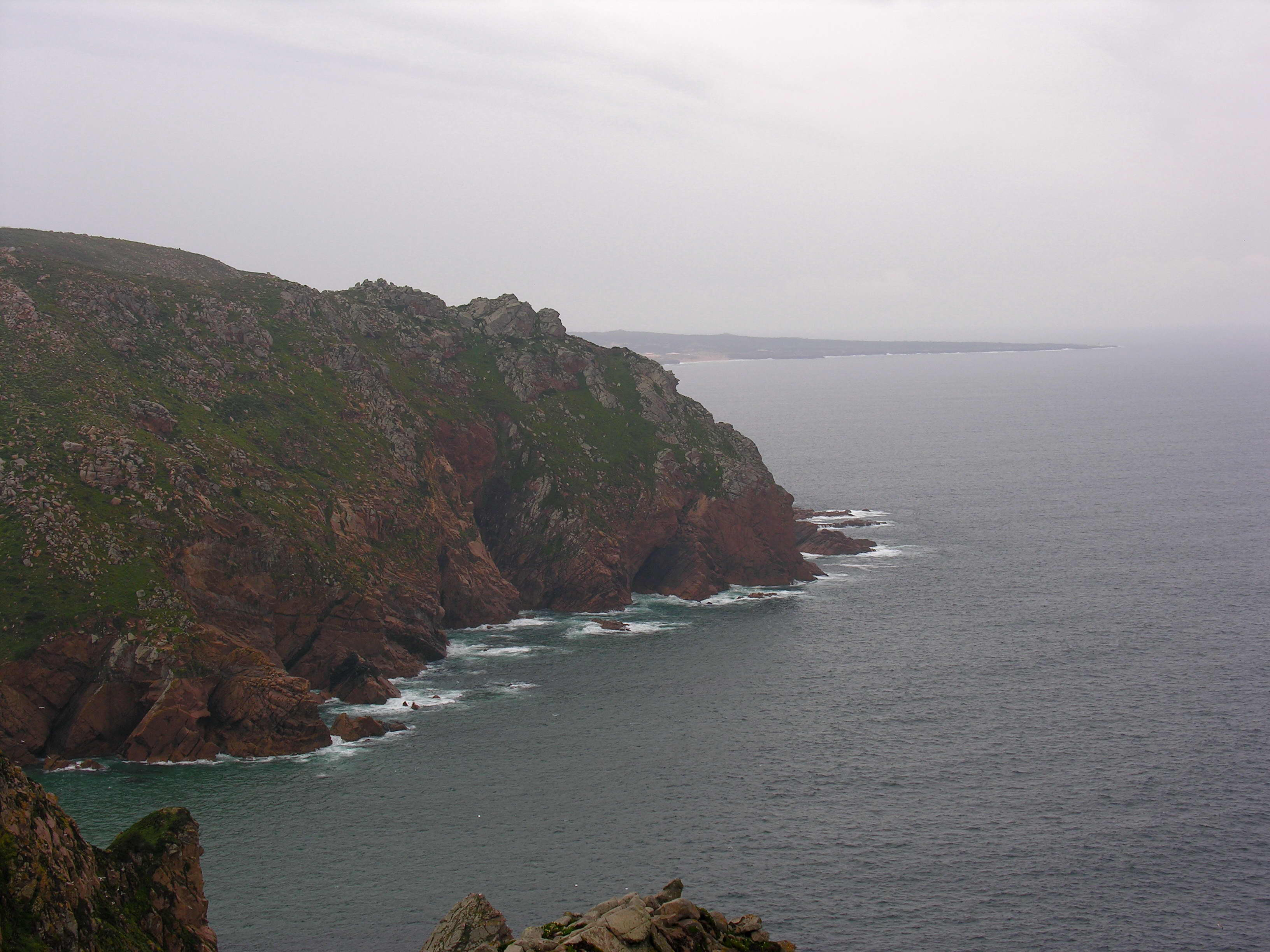 Cabo da Roca, Sintra, Portugal